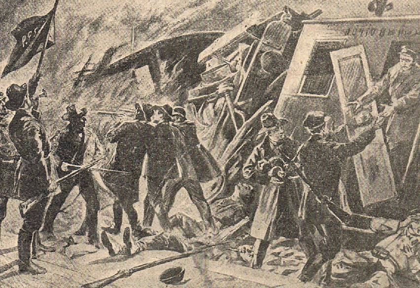 Rysunek przedstawiający akcję OB PPS pod Rogowem 1906